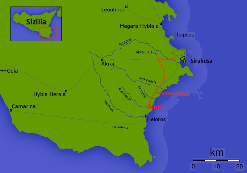 Atenastar espedizioaren amaiera